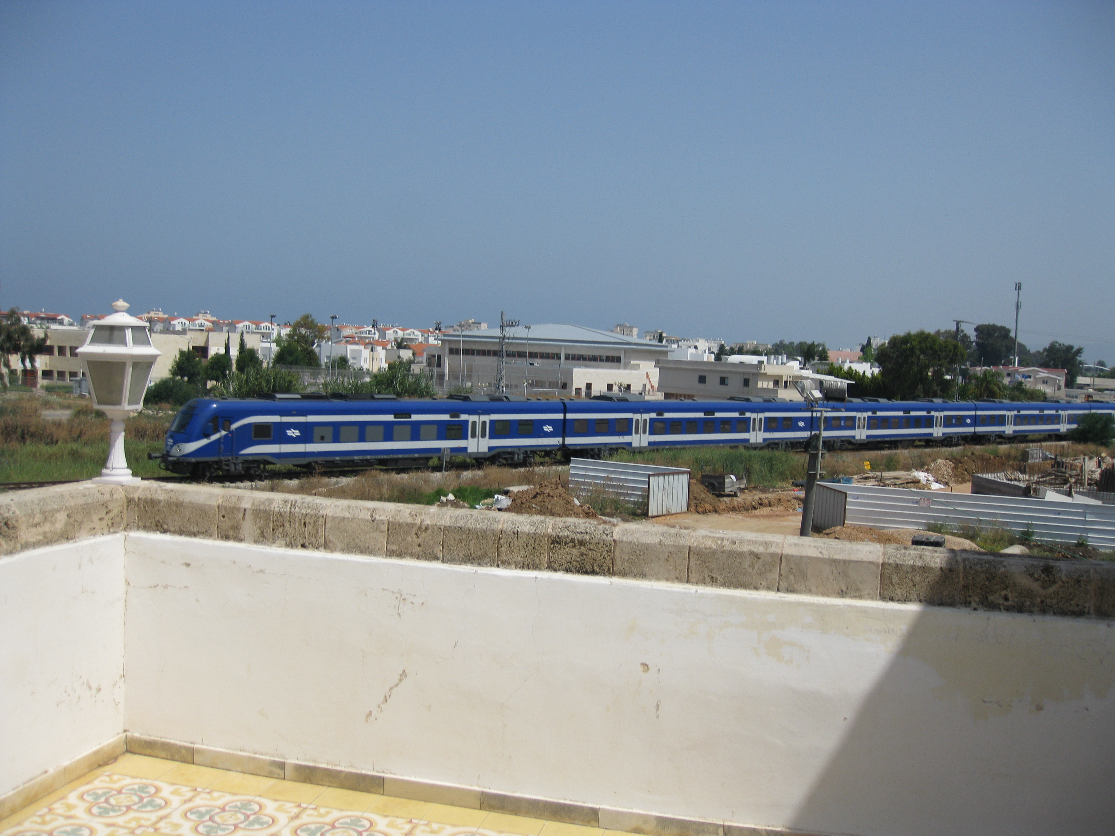 Nahariyya - Liberman House Museum - נהריה בית ליברמן - מוזיאון להיסטוריה של נהריה - מבט על רכבות חולפות